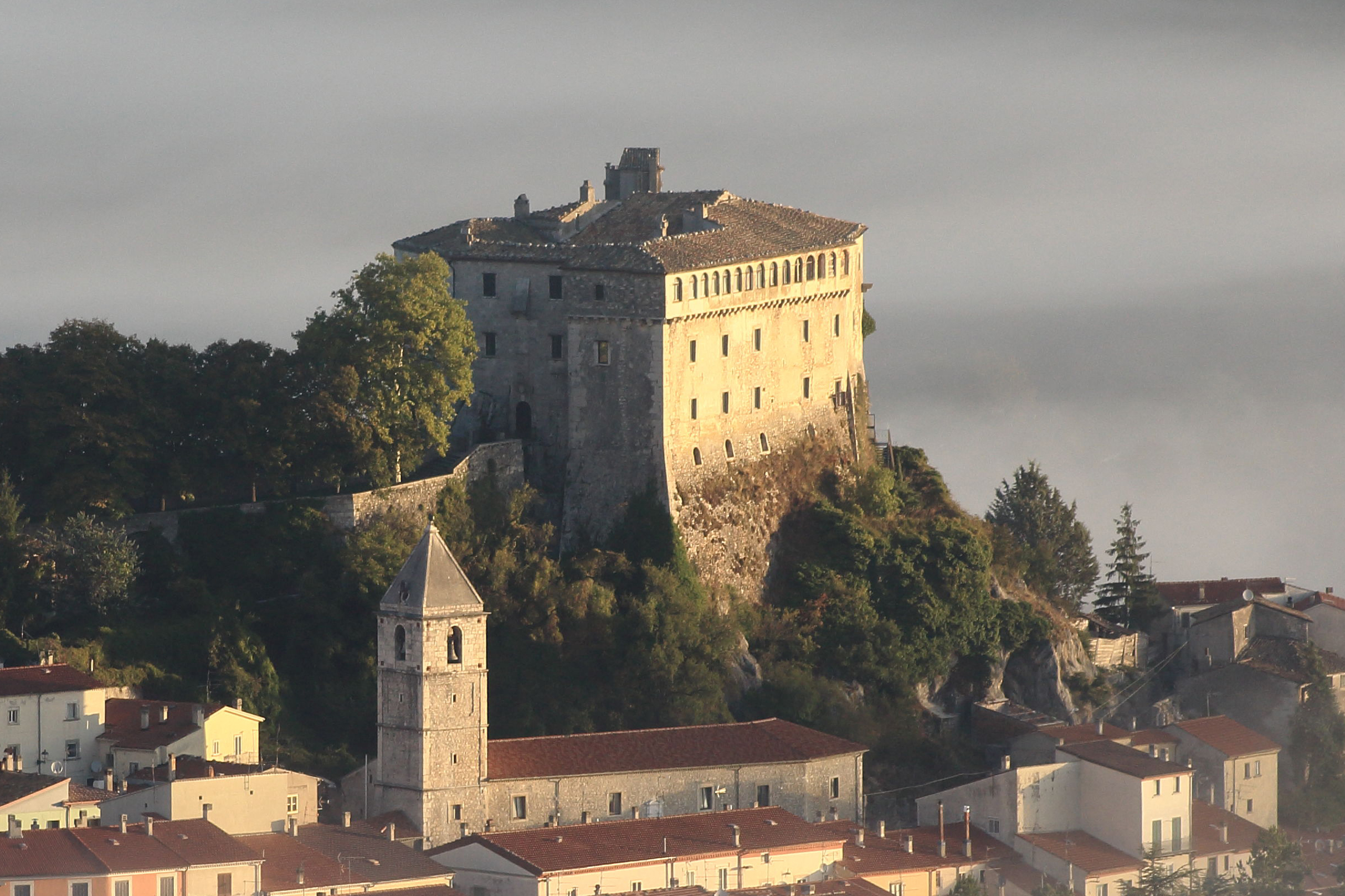 Veduta aerea del castello